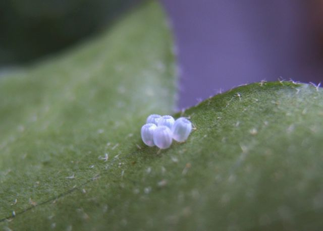 Abgelegte Eier auf einem Efeublatt in fortgeschrittenem Stadium (Holunderspanner, Ourapteryx sambucaria), Mittelhessen, Deutschland.